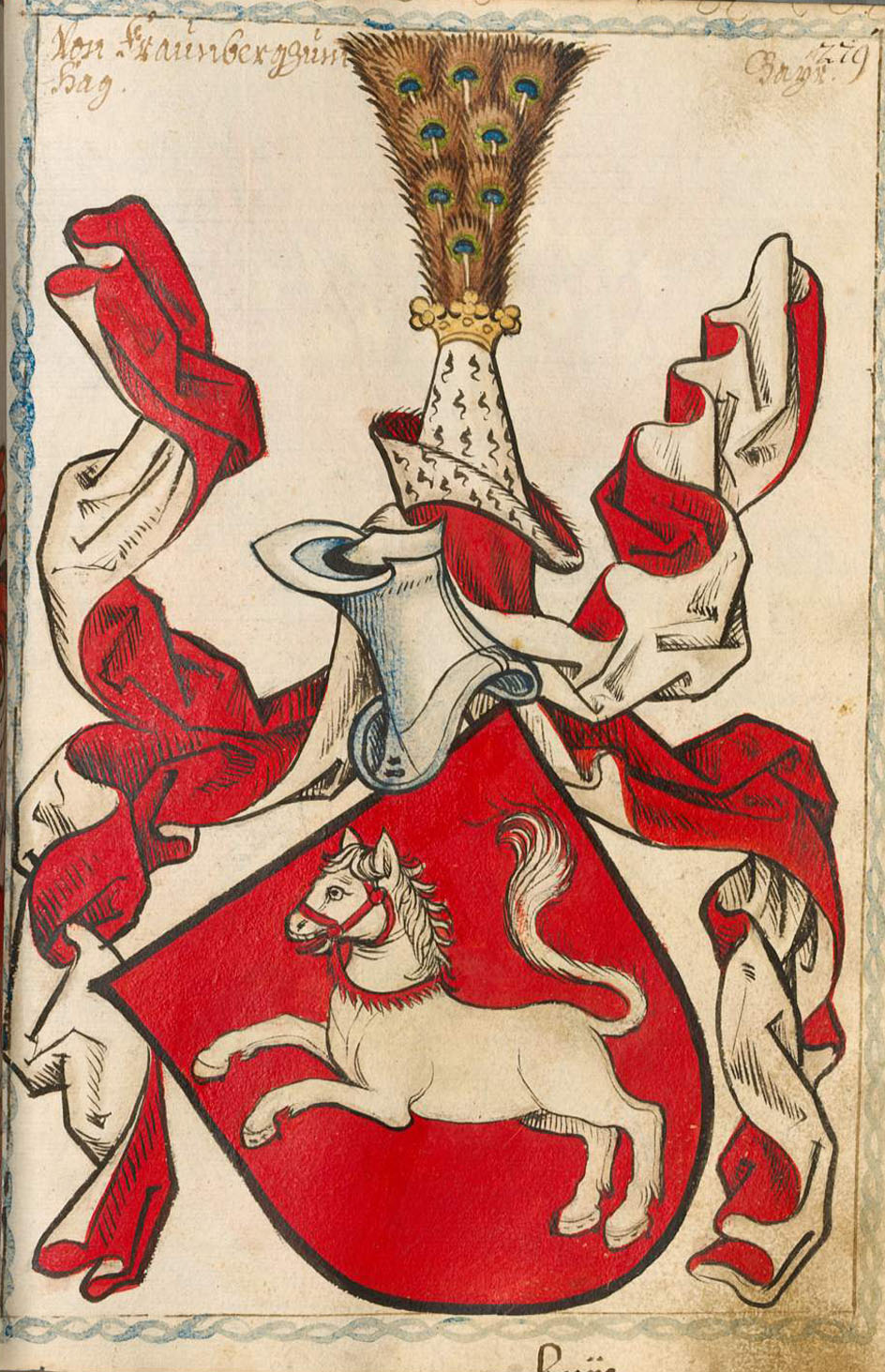 Scheibler'sches Wappenbuch , älterer Teil Bayern Frauenberg zum Haag